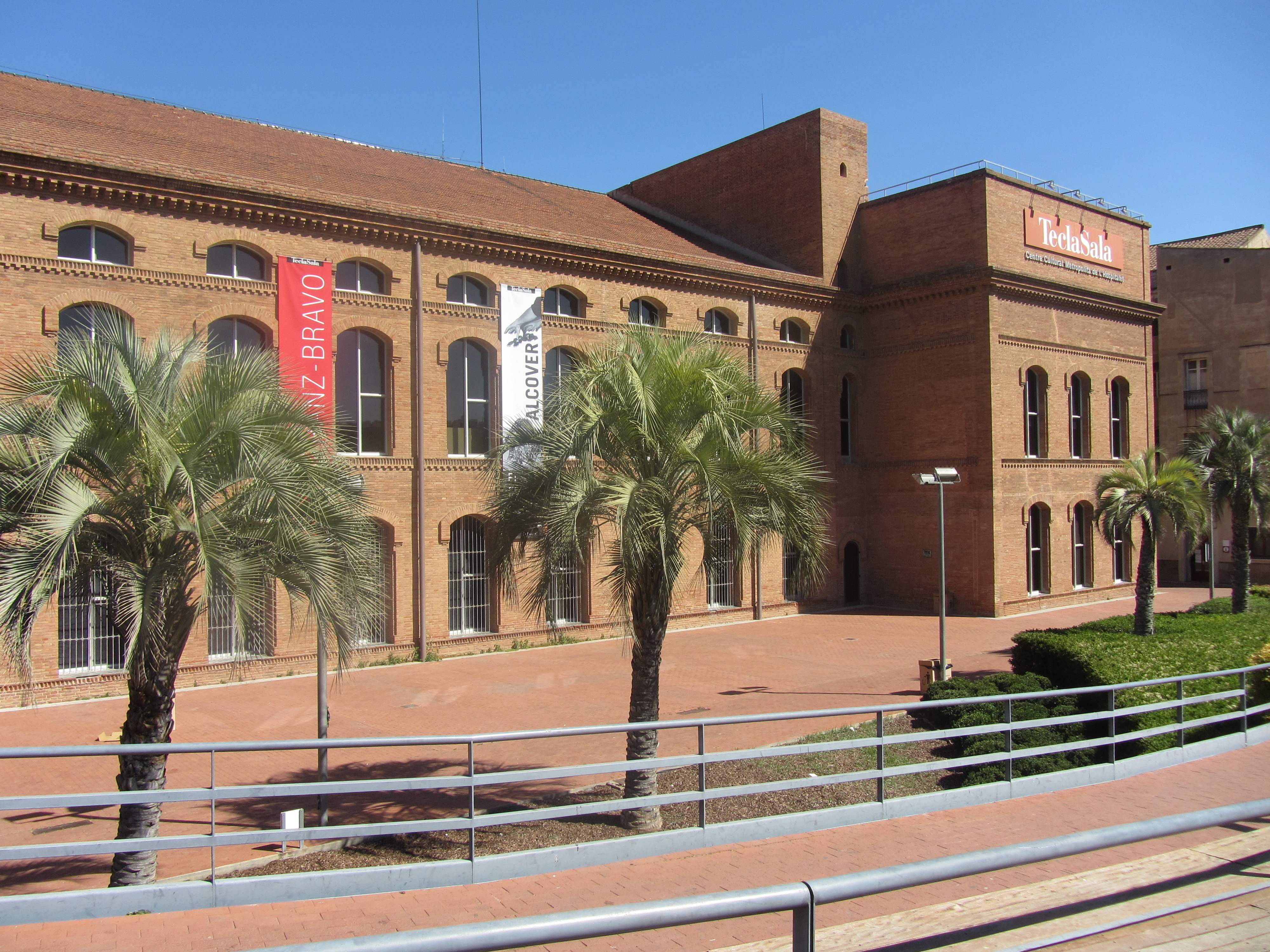 Centre Cultural Tecla Sala